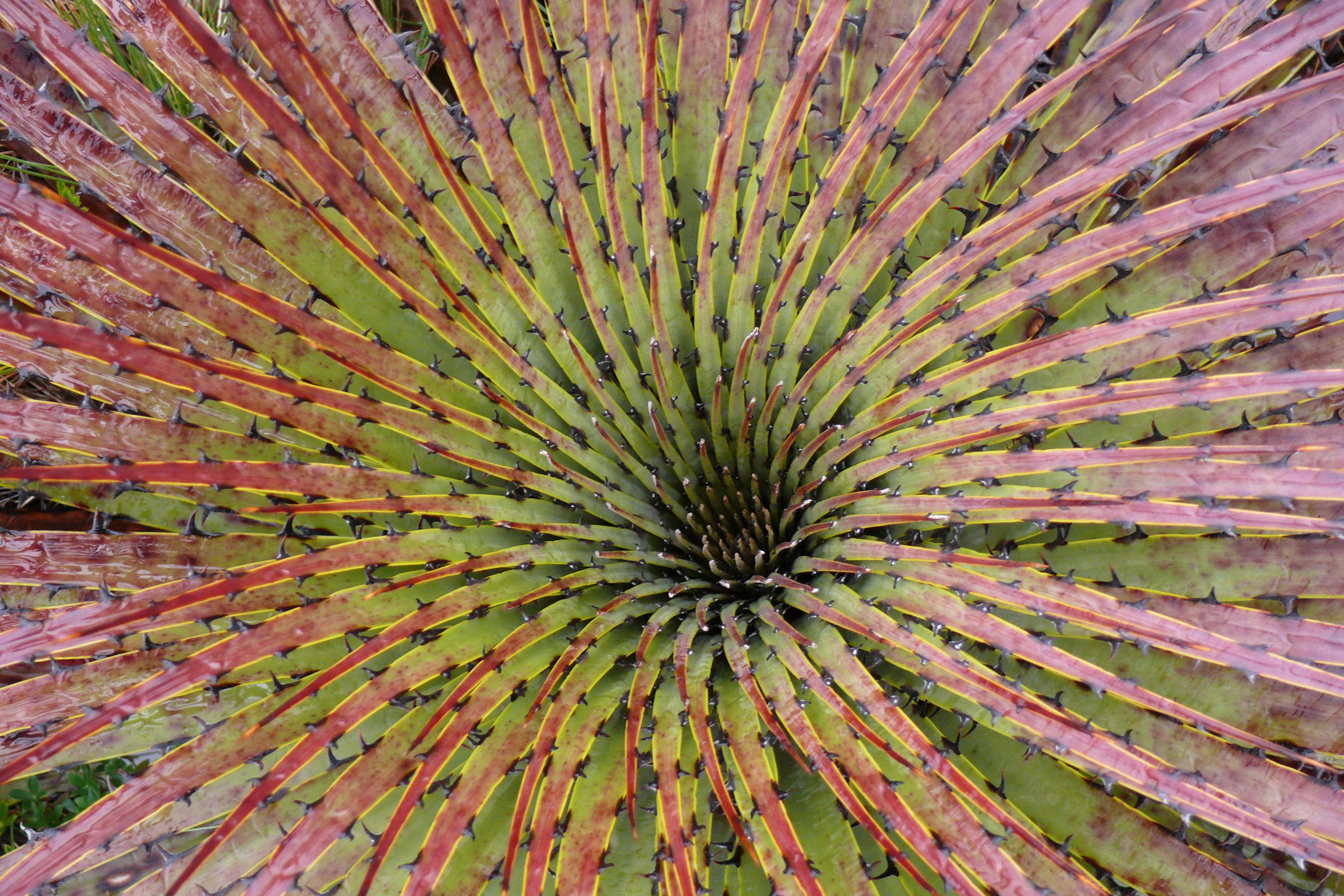 Achupilla, Aguarongo (Puya clava-herculis) Place: Parque Nacional Cajas (Ecuador).